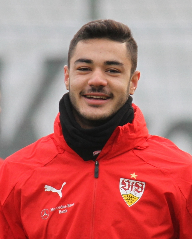 Ozan Kabak bei seiner ersten Einheit für den VfB Stuttgart. Aufgenommen von